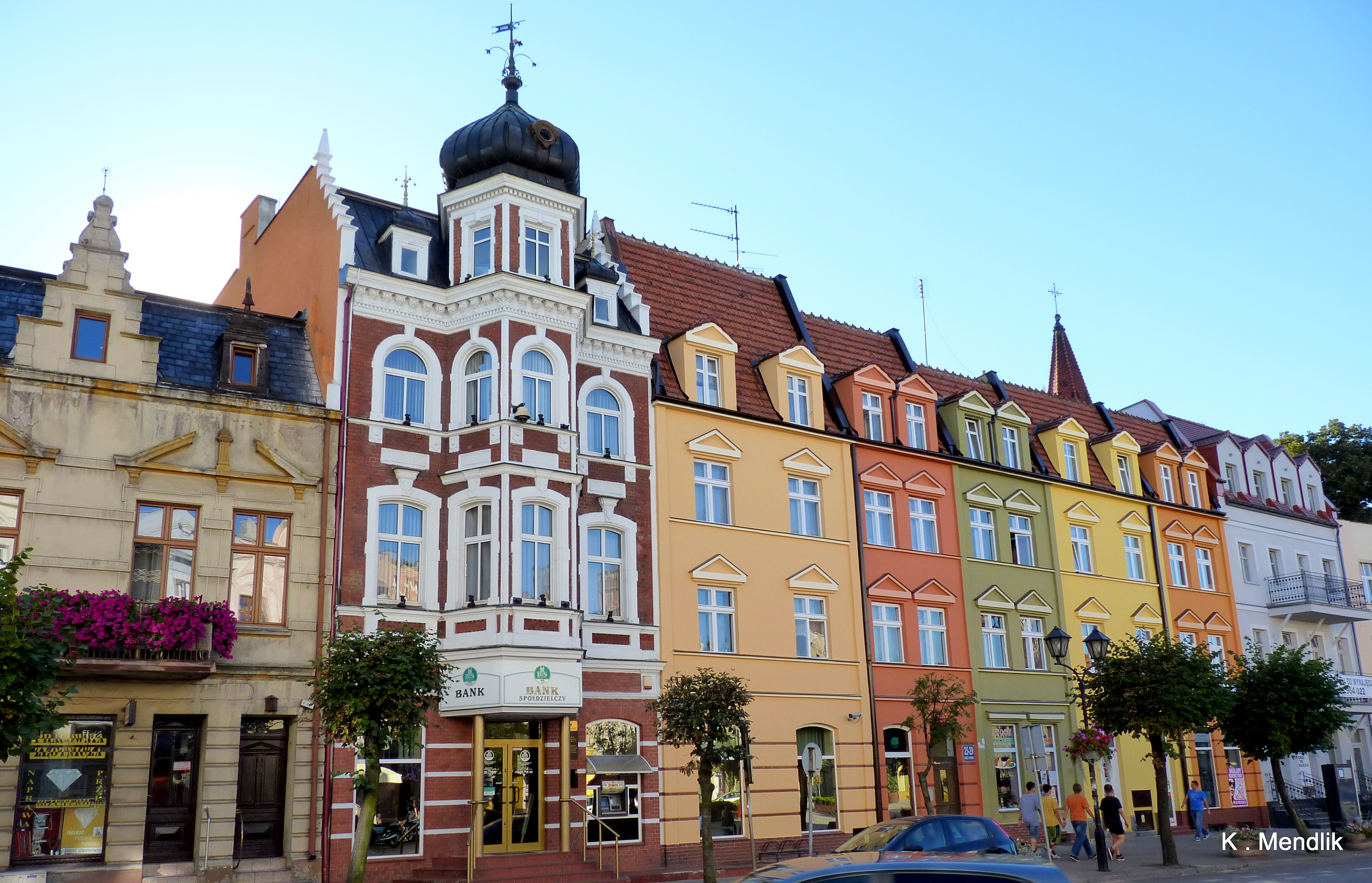 Brodnica. ... Duży Rynek